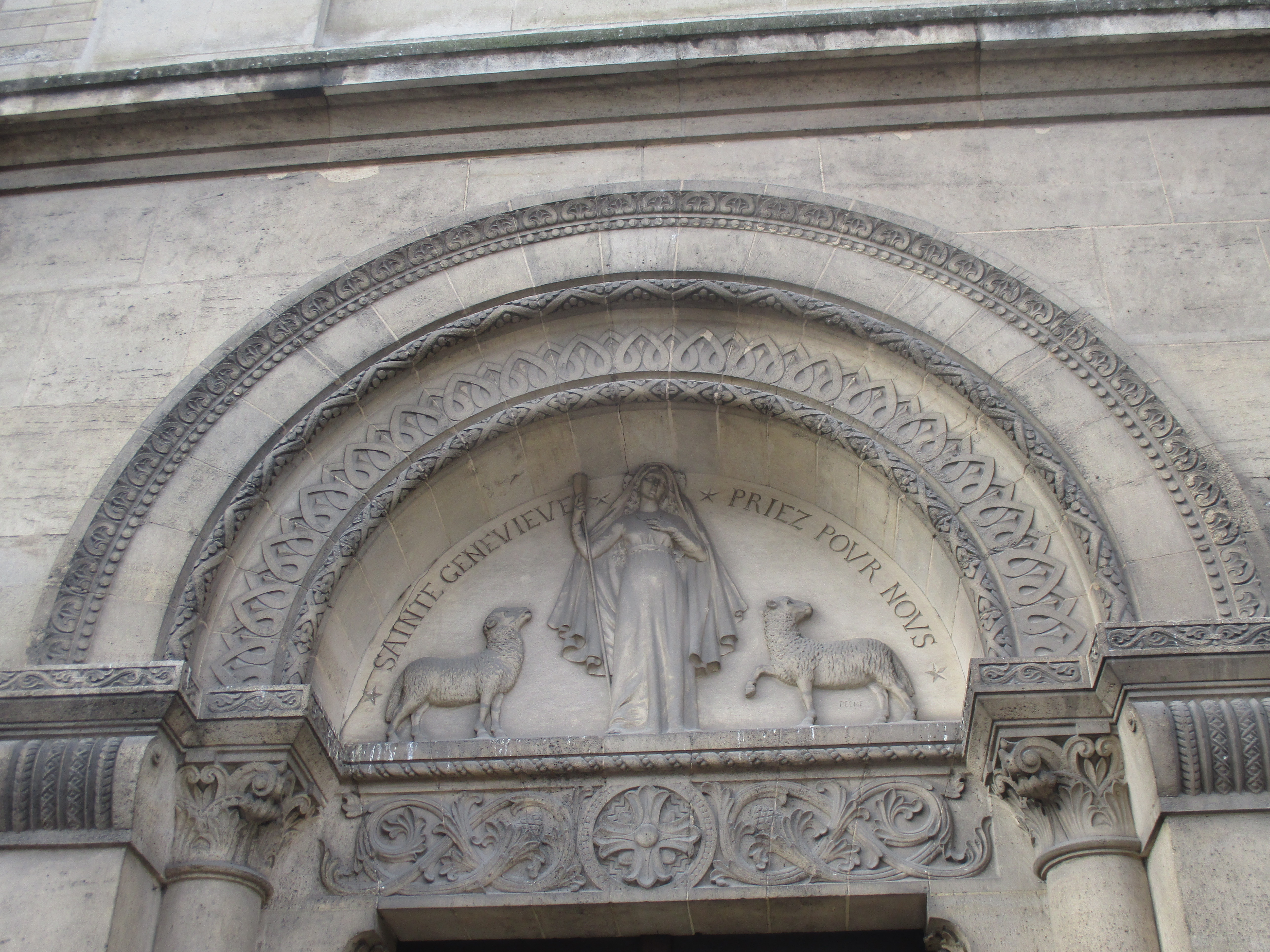 Tympan de l'église Sainte-Geneviève de La Plaine-Saint-Denis. Sainte Geneviève, priez pour nous ǃ